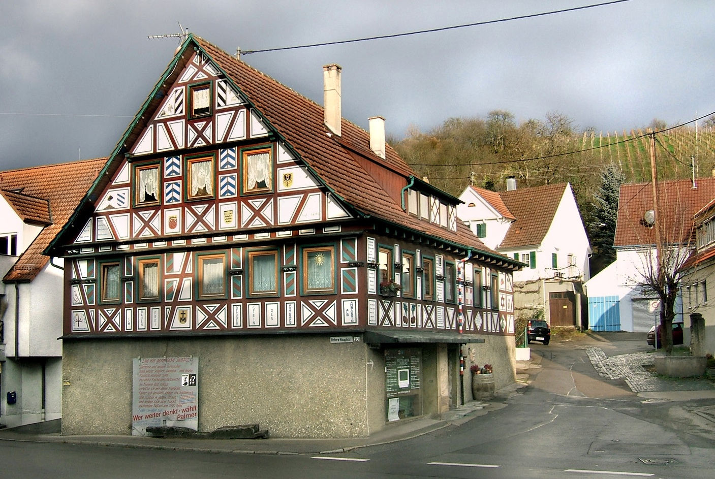 Das Haus von Helmut Palmer in Remshalden-Geradstetten in Deutschland. Das Fachwerkhaus ist über und über mit Parolen, Statements, Daten, Wappen und anderem geschmückt. Einige Zitate: "Unruhe ist erste Bürgerpflicht""Lieber Stein des Anstosses als anstössig""Ein kleiner Spatz wies Amtsleuten den Weg""Eine geniale Leistung des Schneiders von Ulm vom simplen Volk verkannt und verspottet""Dommheit dui isch so: selbr merkt mr nex drvo""Und vergib ihnen nicht, denn sie wissen, was sie tun"